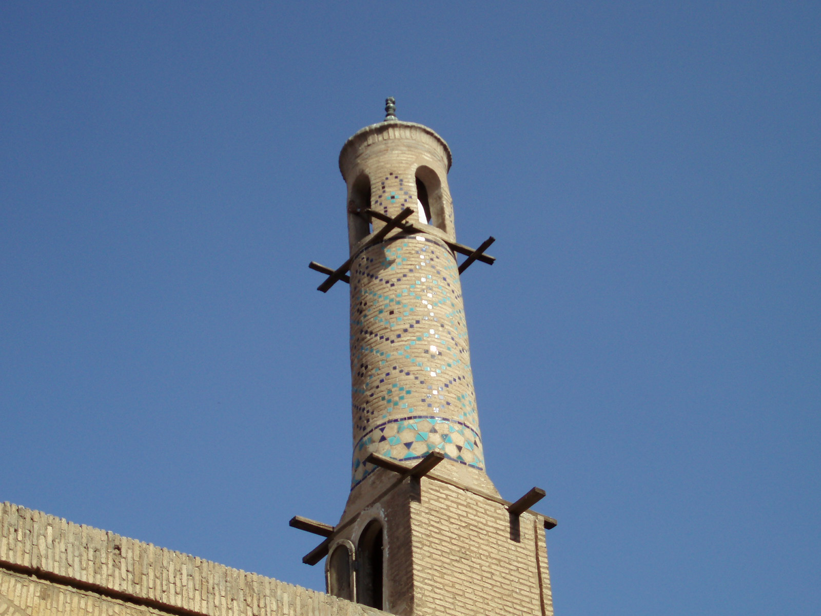 Iran 2007 239 Manar Jomban